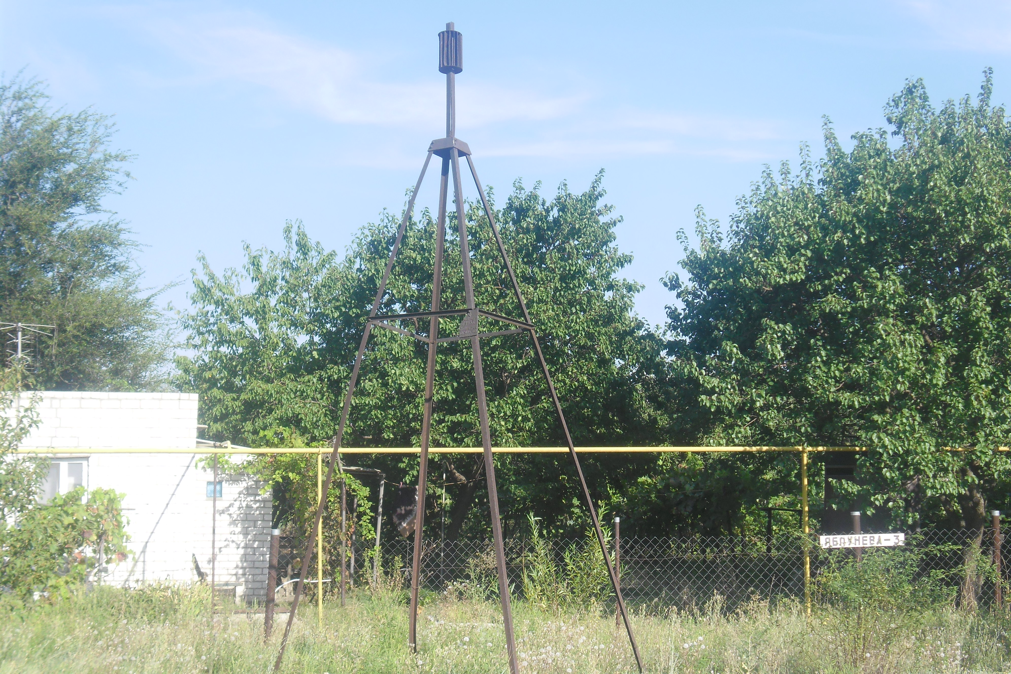 Фото